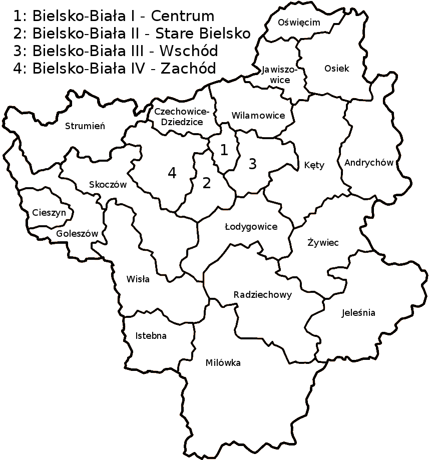 Dekanaty diecezji bielsko-żywieckiej